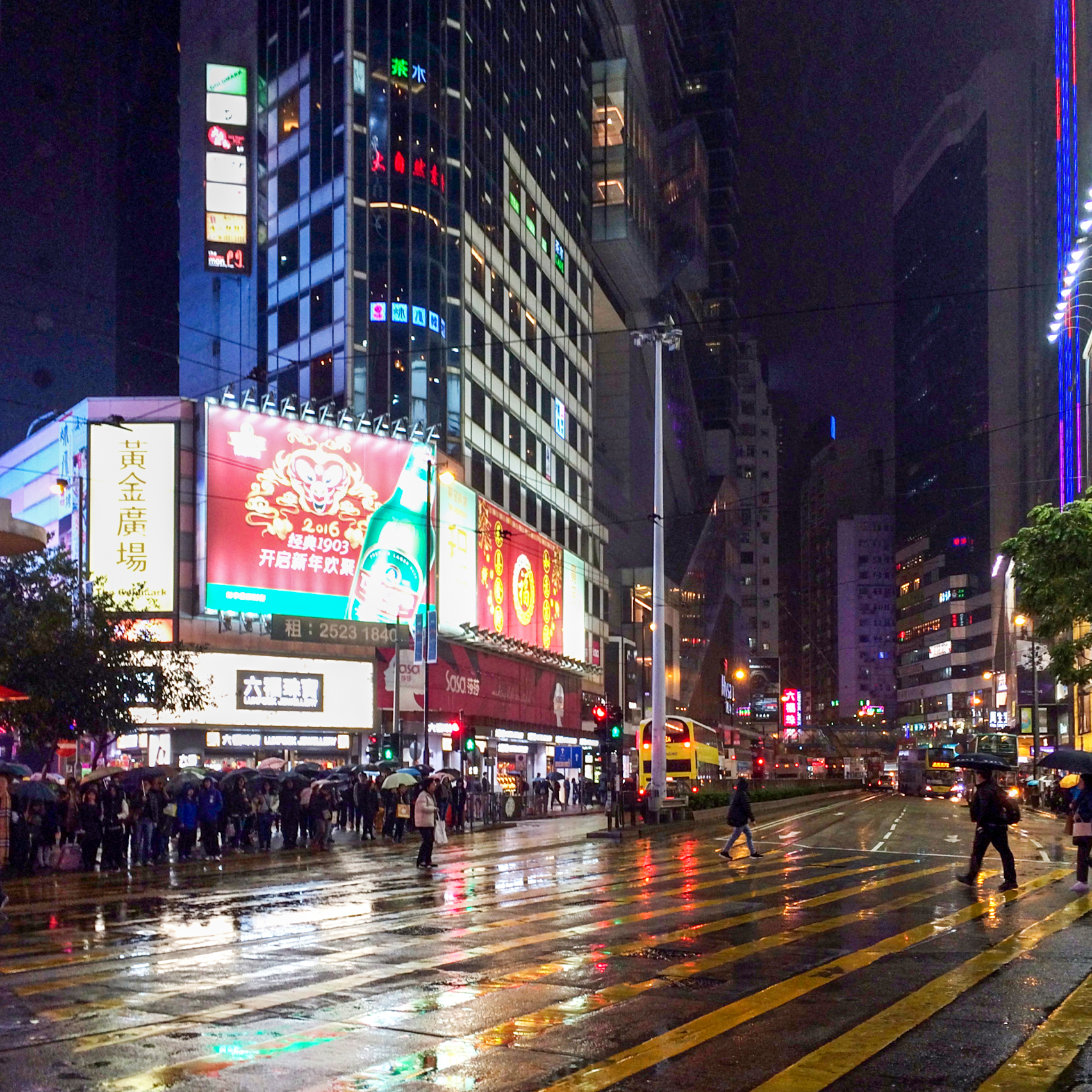 Hennessy Road Night view